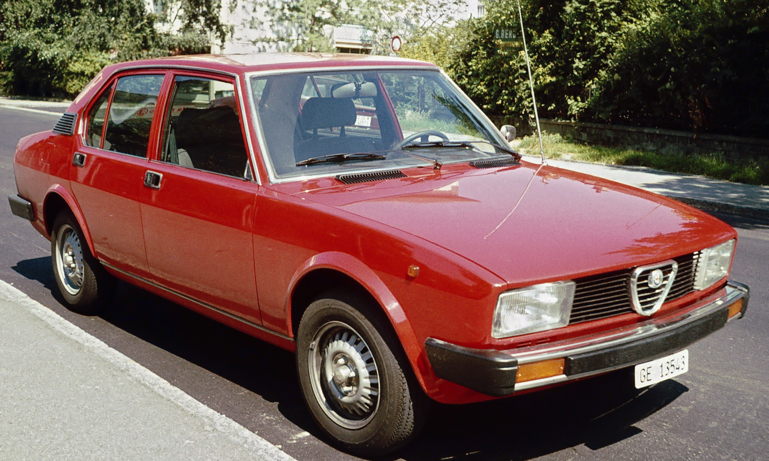 Alfetta from Geneva